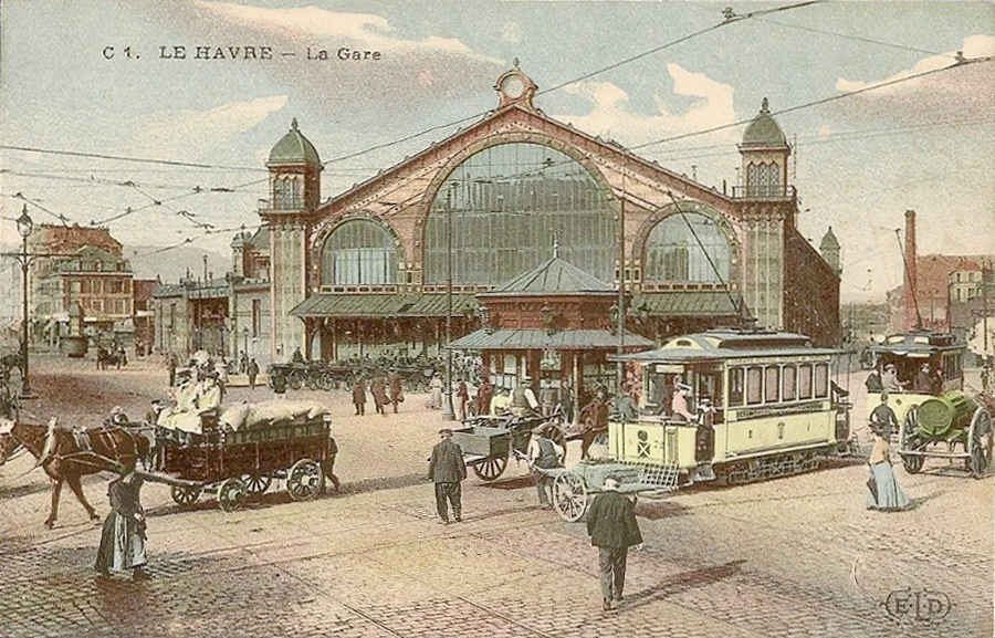 La gare de d'arrivée du Havre réalisée par l'architecte Juste Lisch en 1882, ouverte en 1883.